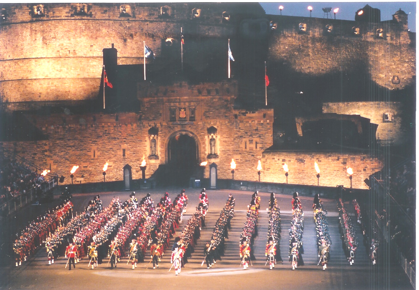 Edinburgh: Militäresche Tatoo